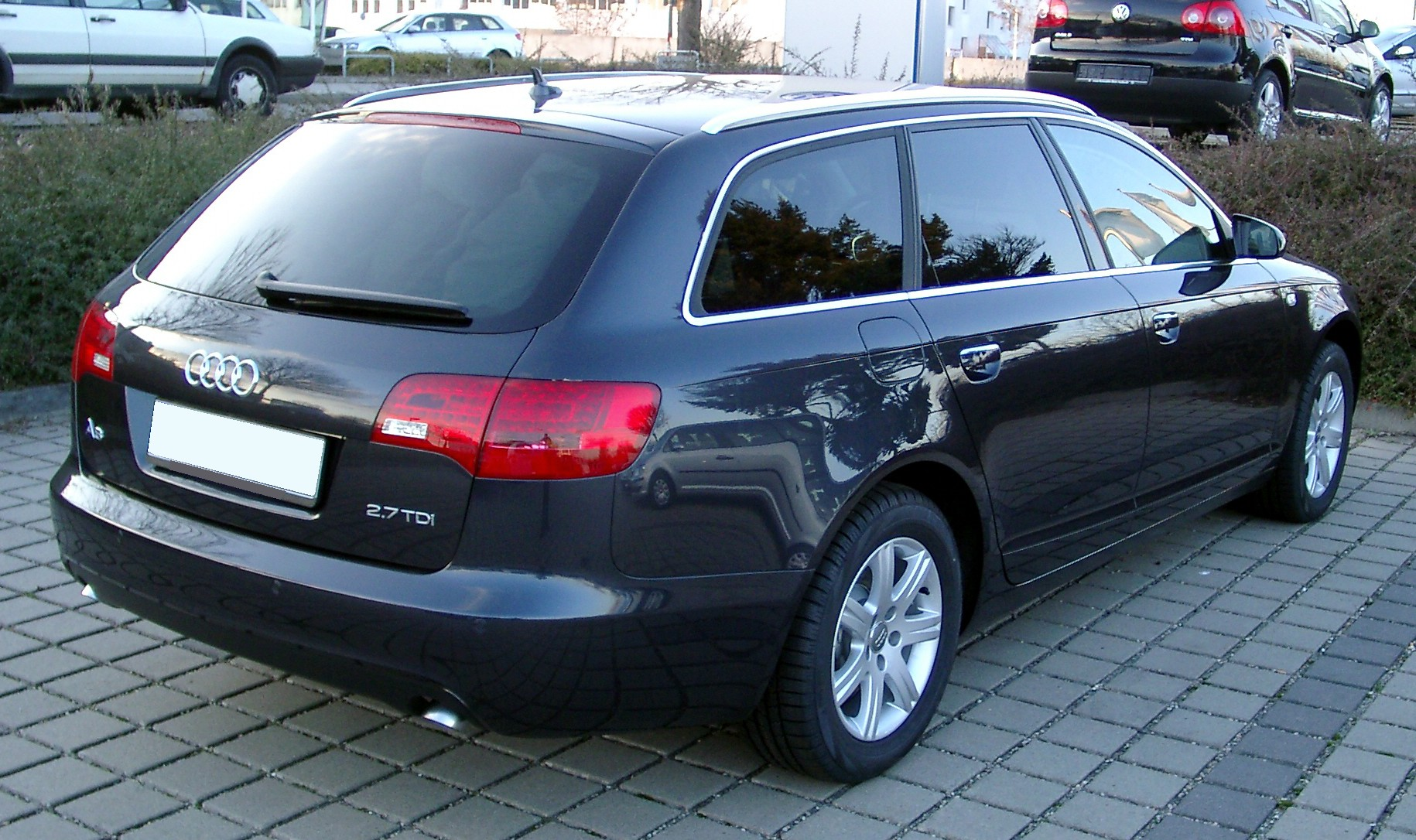 Audi A6 (C6) Kombi